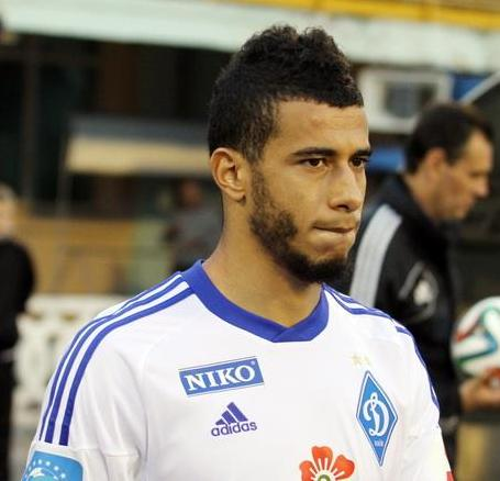 Юнес Беланда - мароканський футболіст під час виступів за Динамо на фіналі Кубку України